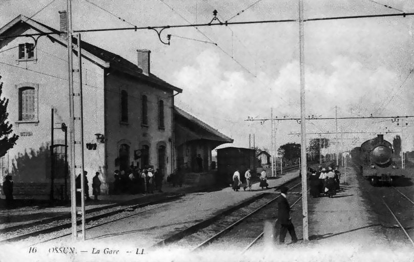 L'intérieur de la gare d'Ossun après l'électrification de la voie par la compagnie du Midi en 1913.